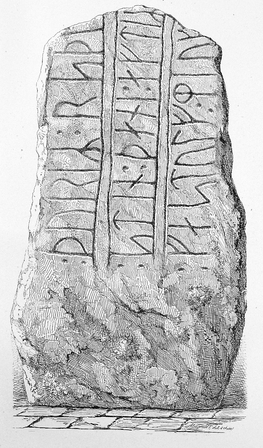 Øster Alling-stenen er en runesten, fundet i Øster Alling omkring 1627.